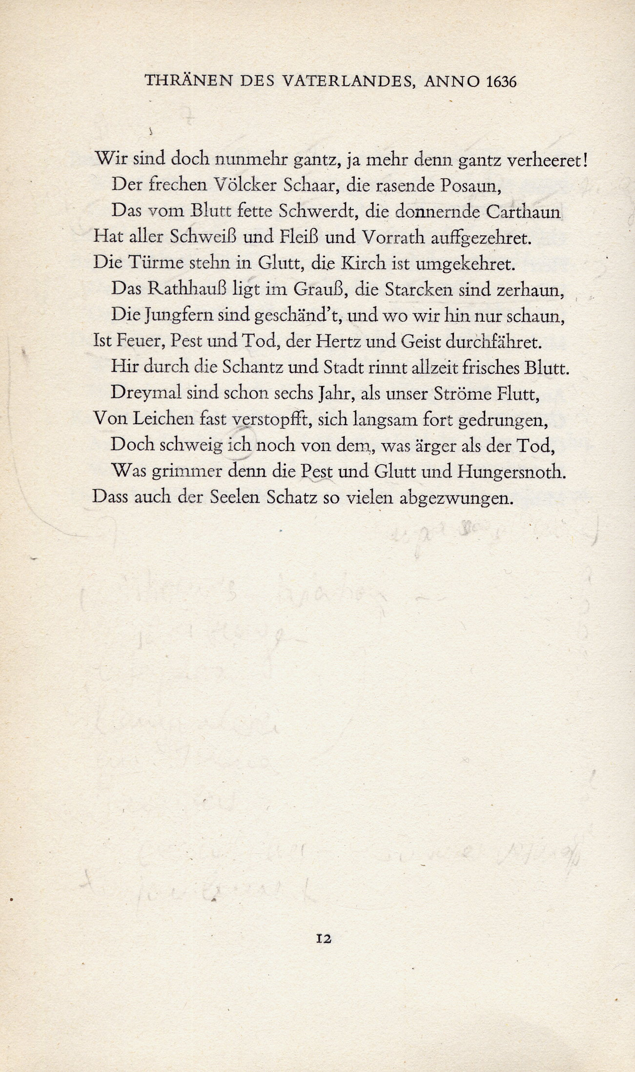 Andreas Gryphius: Thränen des Vaterlandes Anno 1636